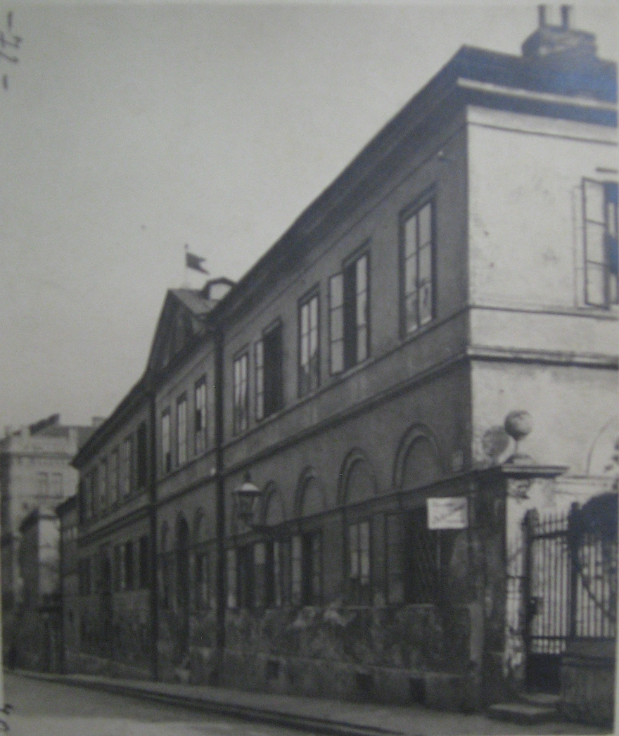 Czartoryski-Schlössel, Straßenfront. Inv. PK 297